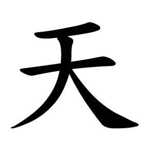 Kanji Ten(Ideograma Chino - Tian)